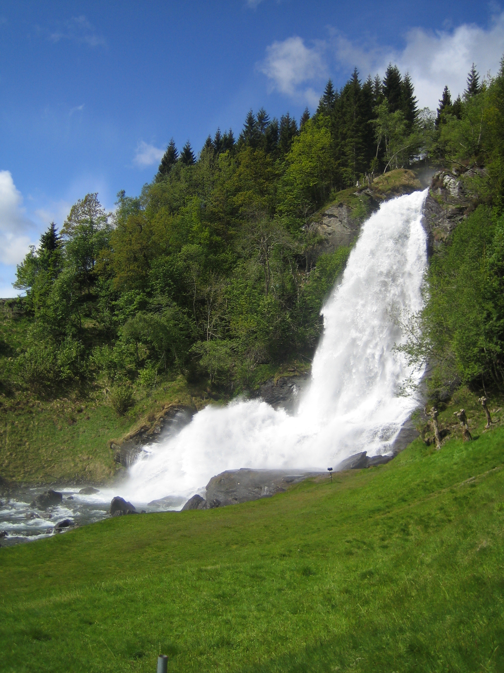 Steinsdalsfossen (Øvsthusfossen/Øfsthusfossen) in Kvam, Hordaland, Norway